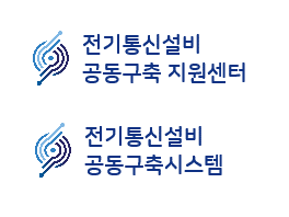 신축 건물로 연결되는 통신입입관로 공사 신청 접수